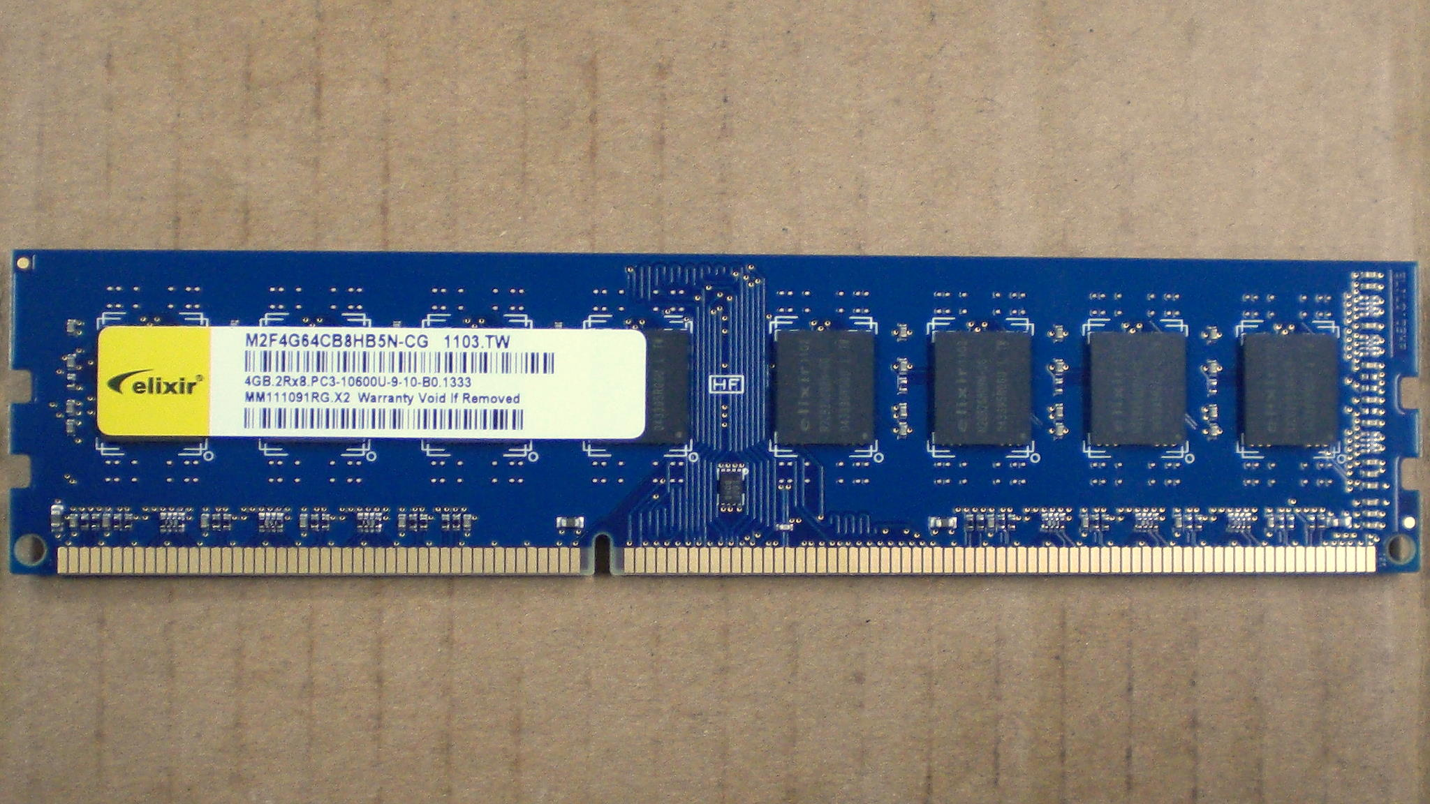 南亞科技於2011年製造的elixir DDR3-1333 4GB記憶體模組M2F4G64CB8HB5N-CG。